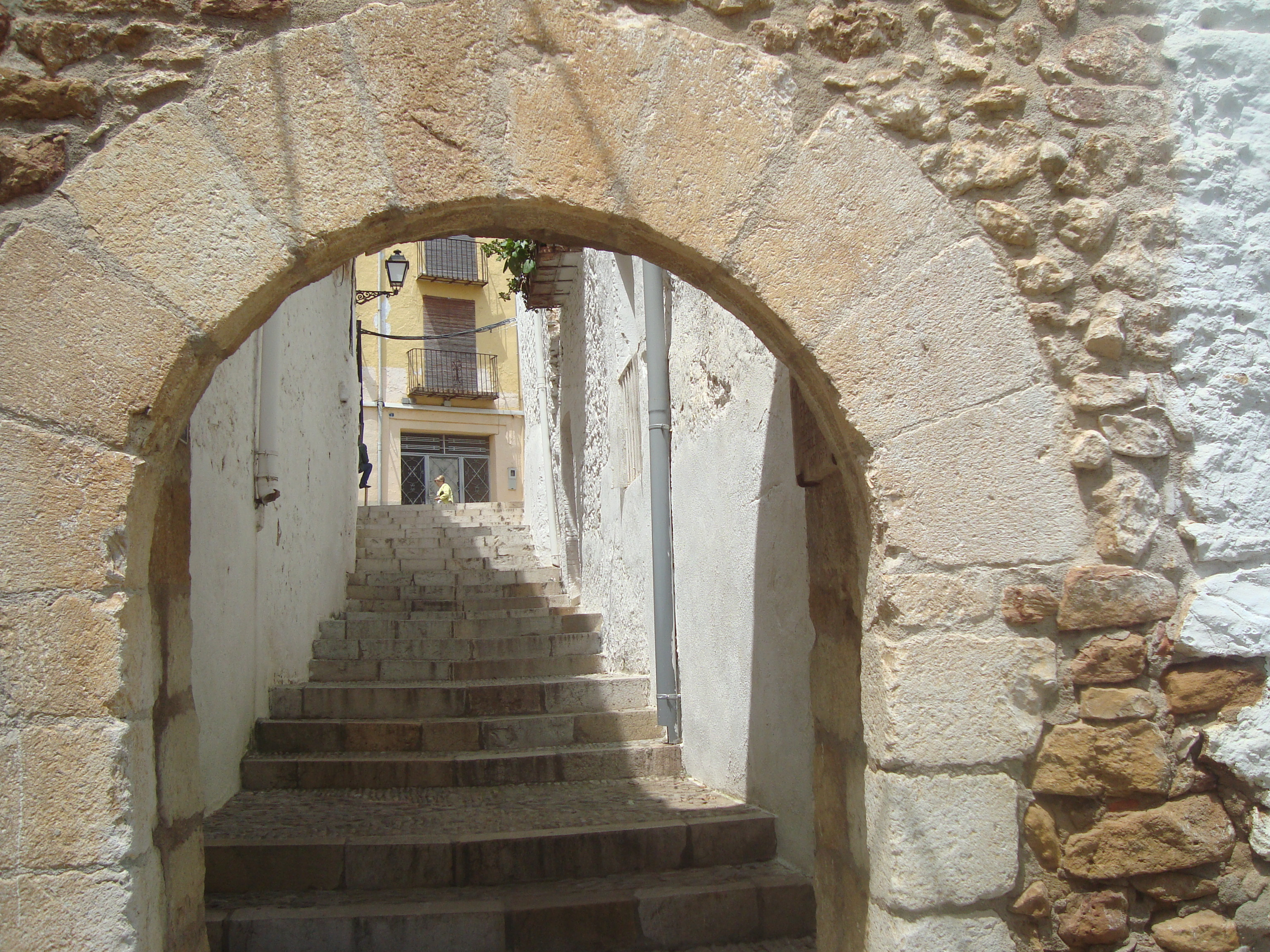 Recinte emmurallat medieval i ampliació del baluard del segle XVII (Traiguera)